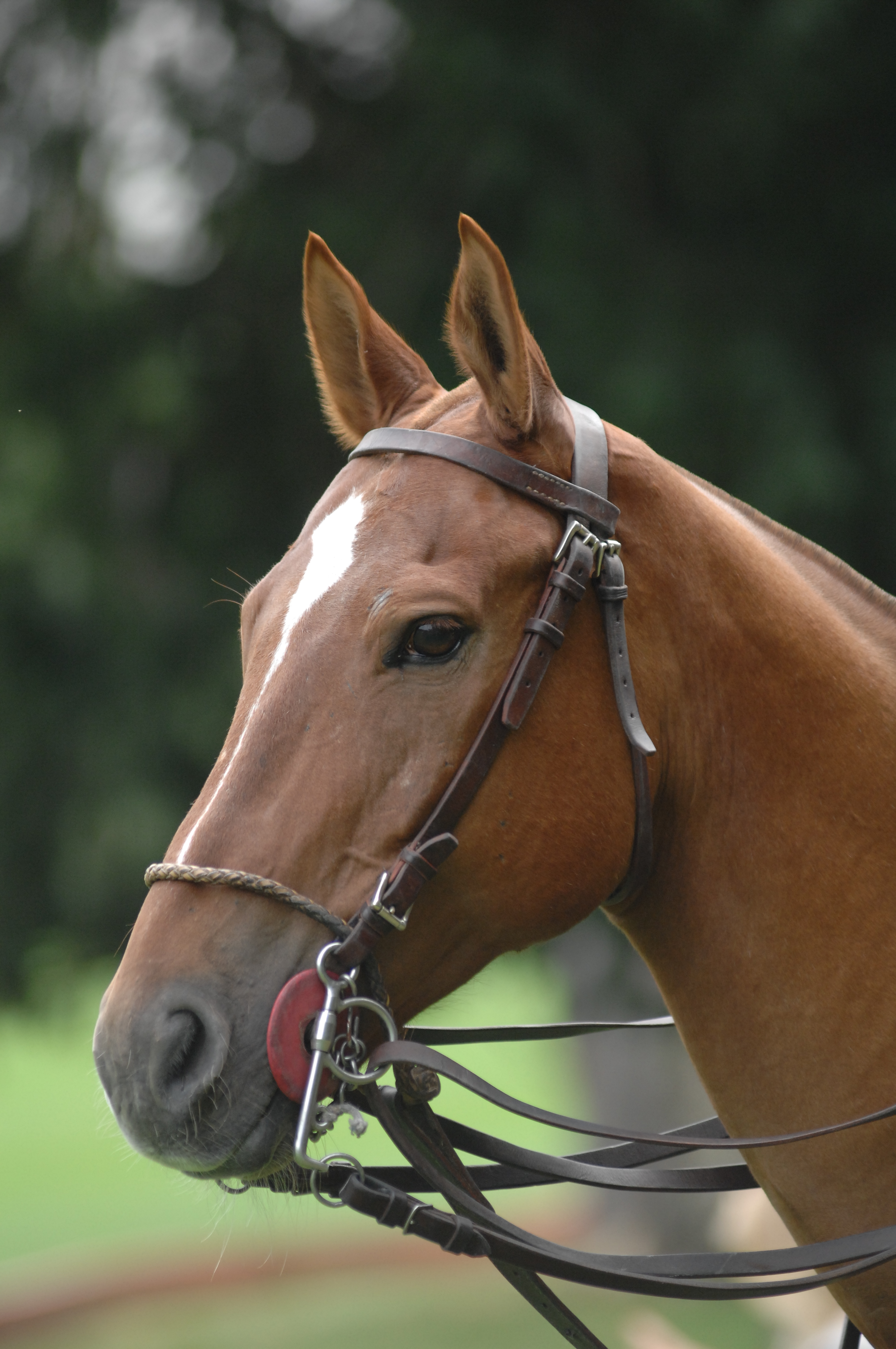 Polo Bridle Pelham